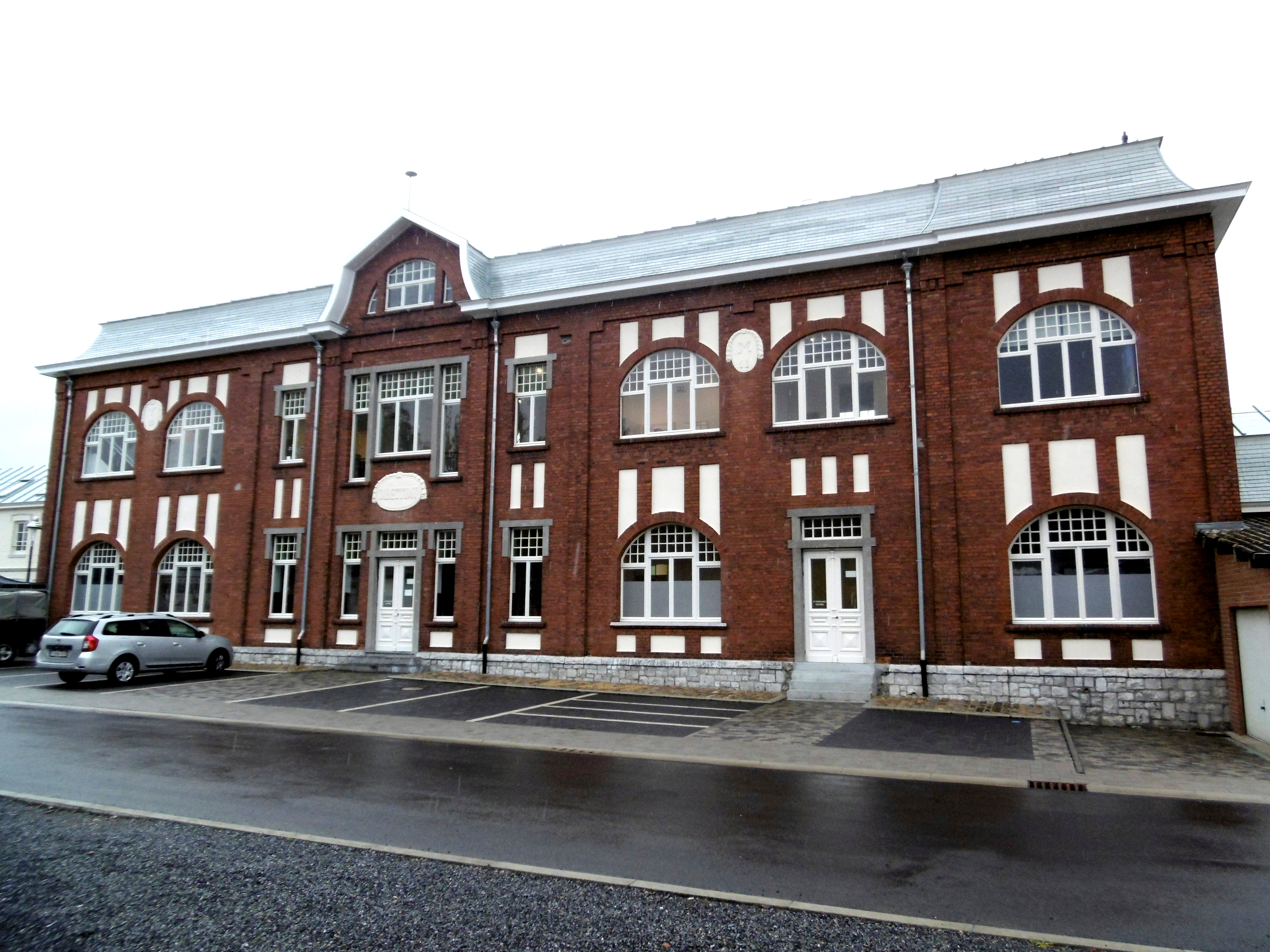 Rückseite des Direktionsgebäudes der Vieille Montagne, heute Museum